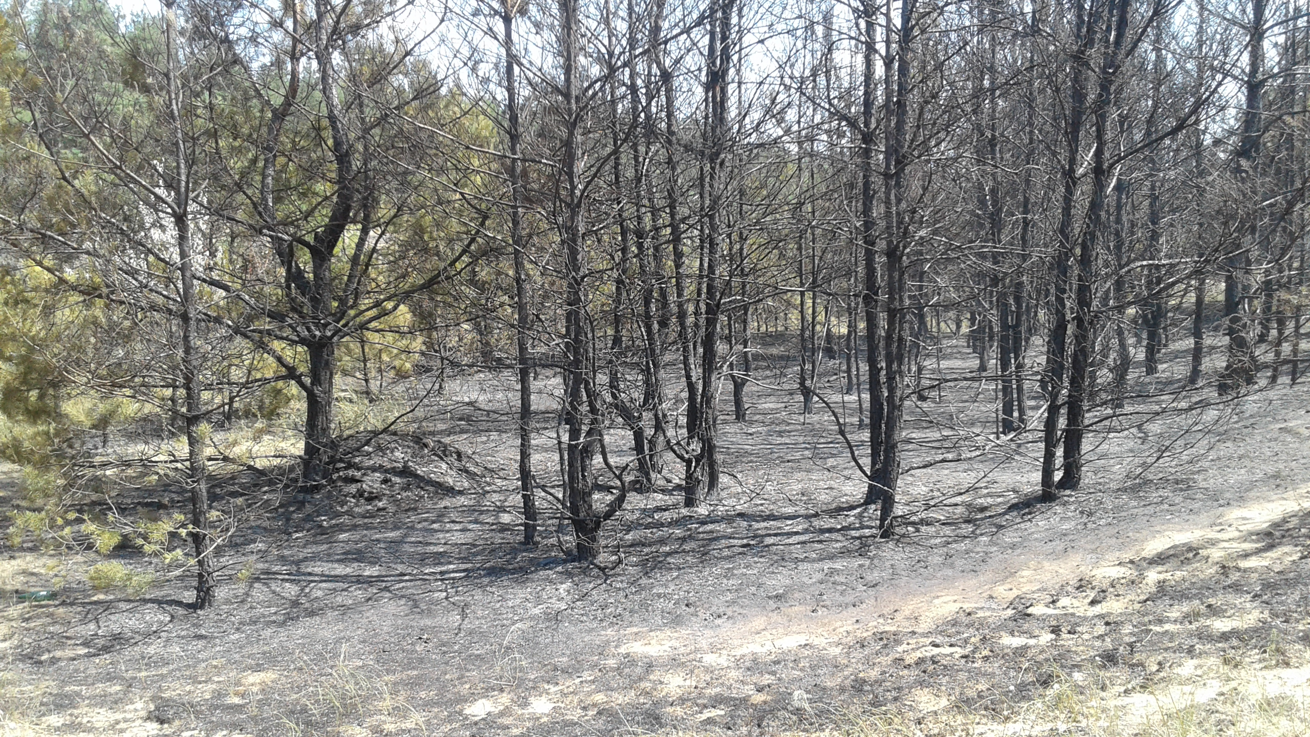 Пожежа в сосновому лісі - хтось кинув недопалок